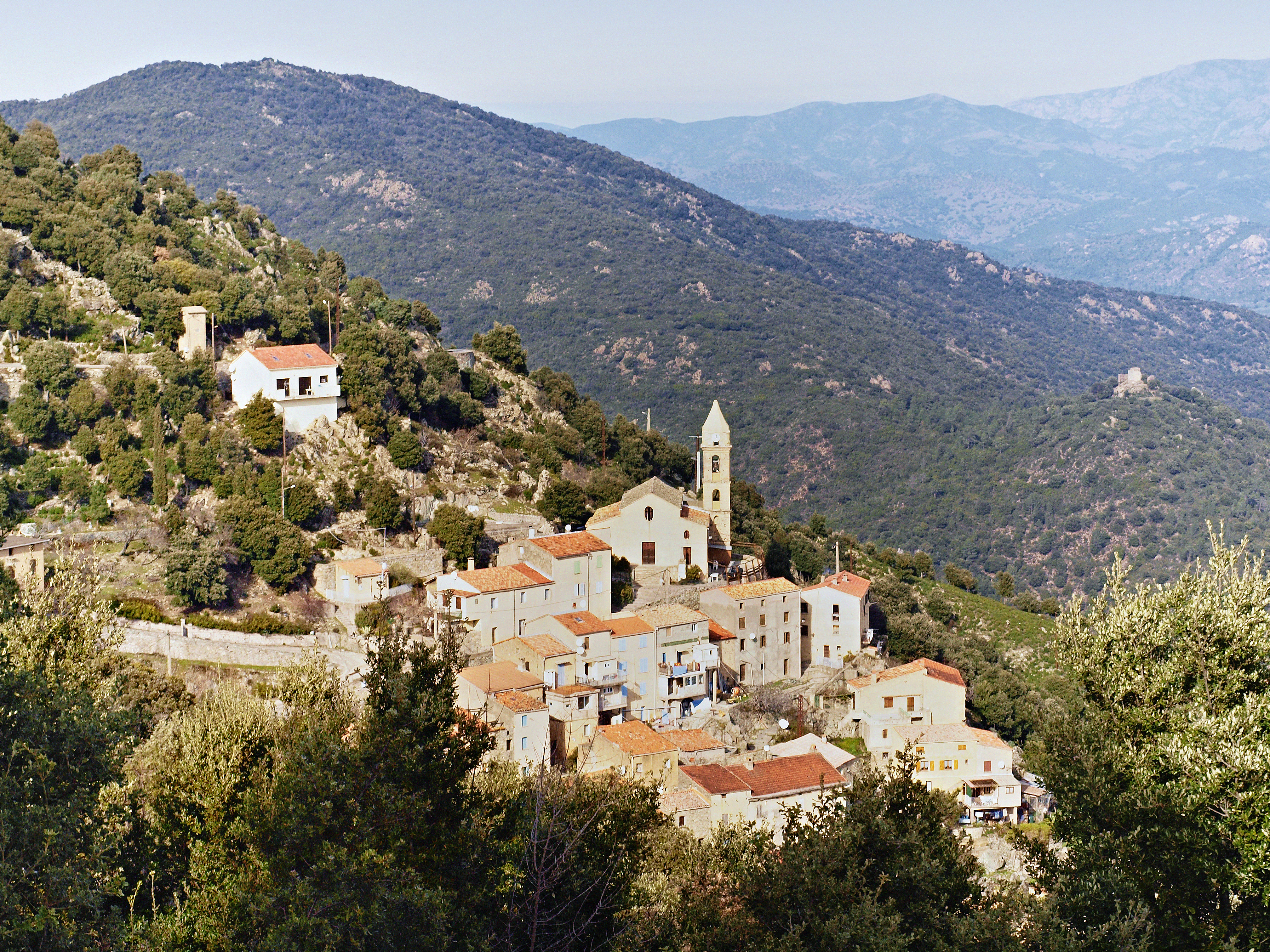 Prato-di-Giovellina (Corsica) - Le village vu de Prato Soprano